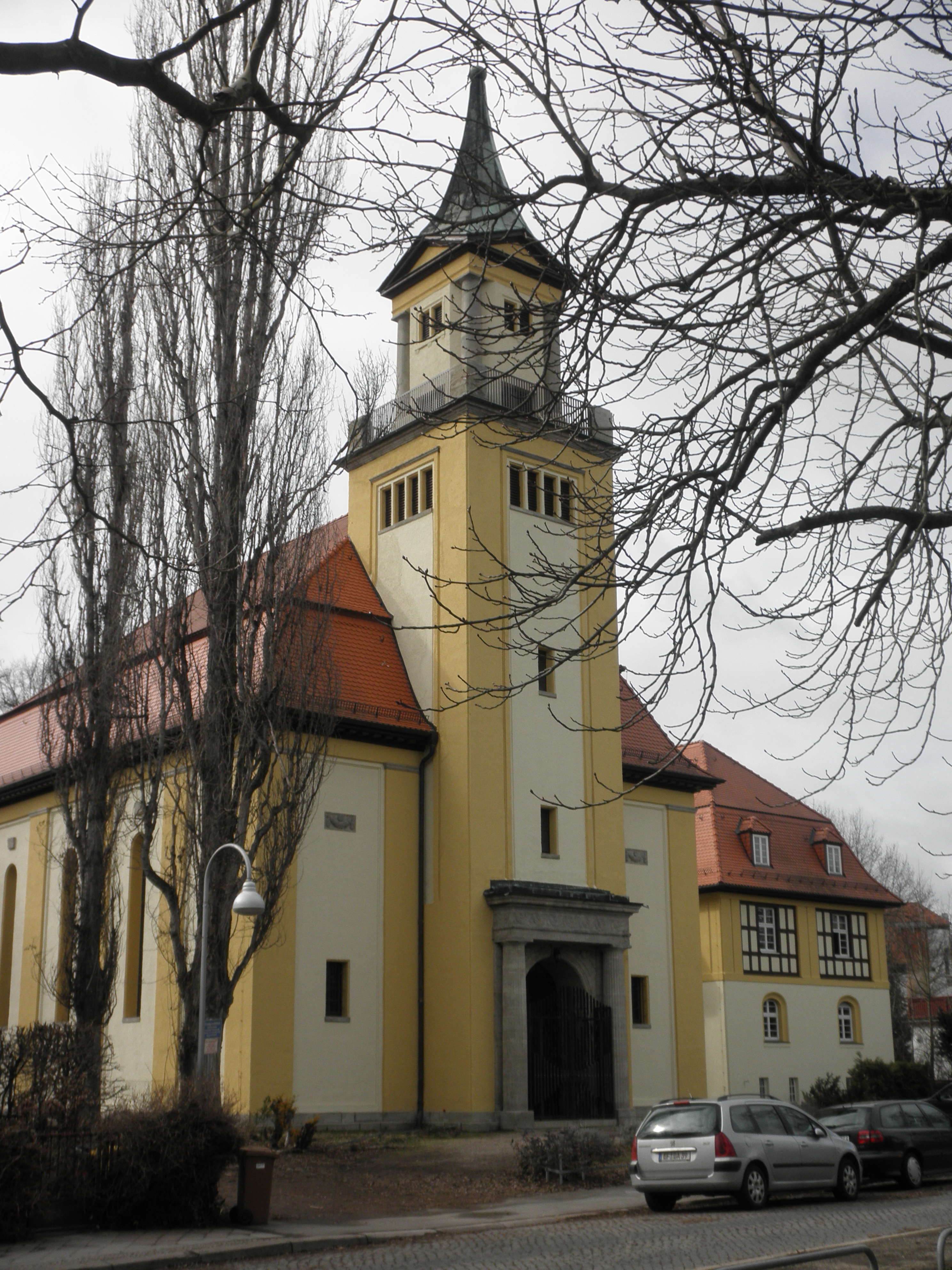 Christuskirche